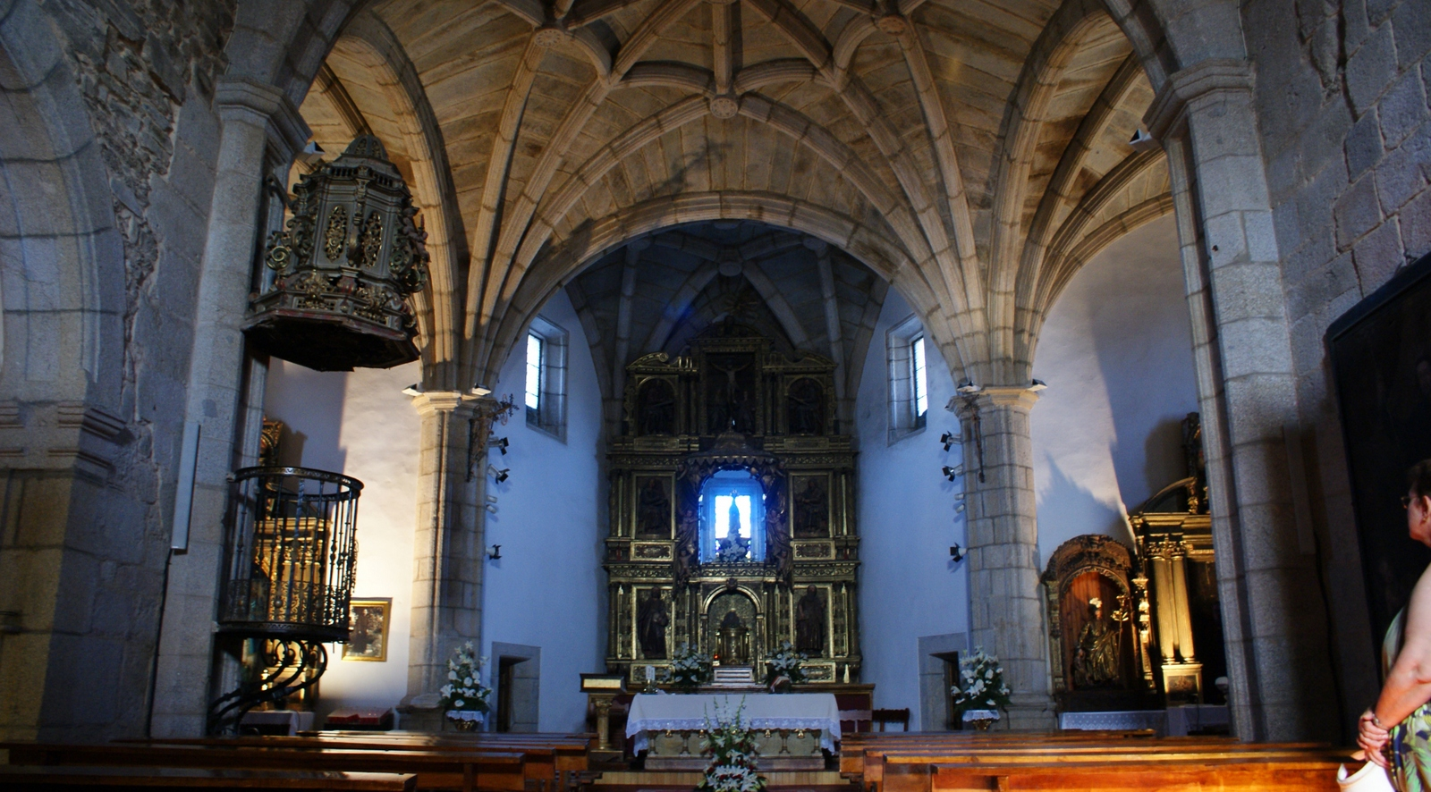 Iglesia de Nuestra Señora del Azogue, construida en el siglo XII, de estilo románico, aunque con importantes transformaciones posteriores en los siglos XVI, XVII y XVIII. Enmarcada dentro del Conjunto Histórico de Puebla de Sanabria. Zamora, Castilla y León